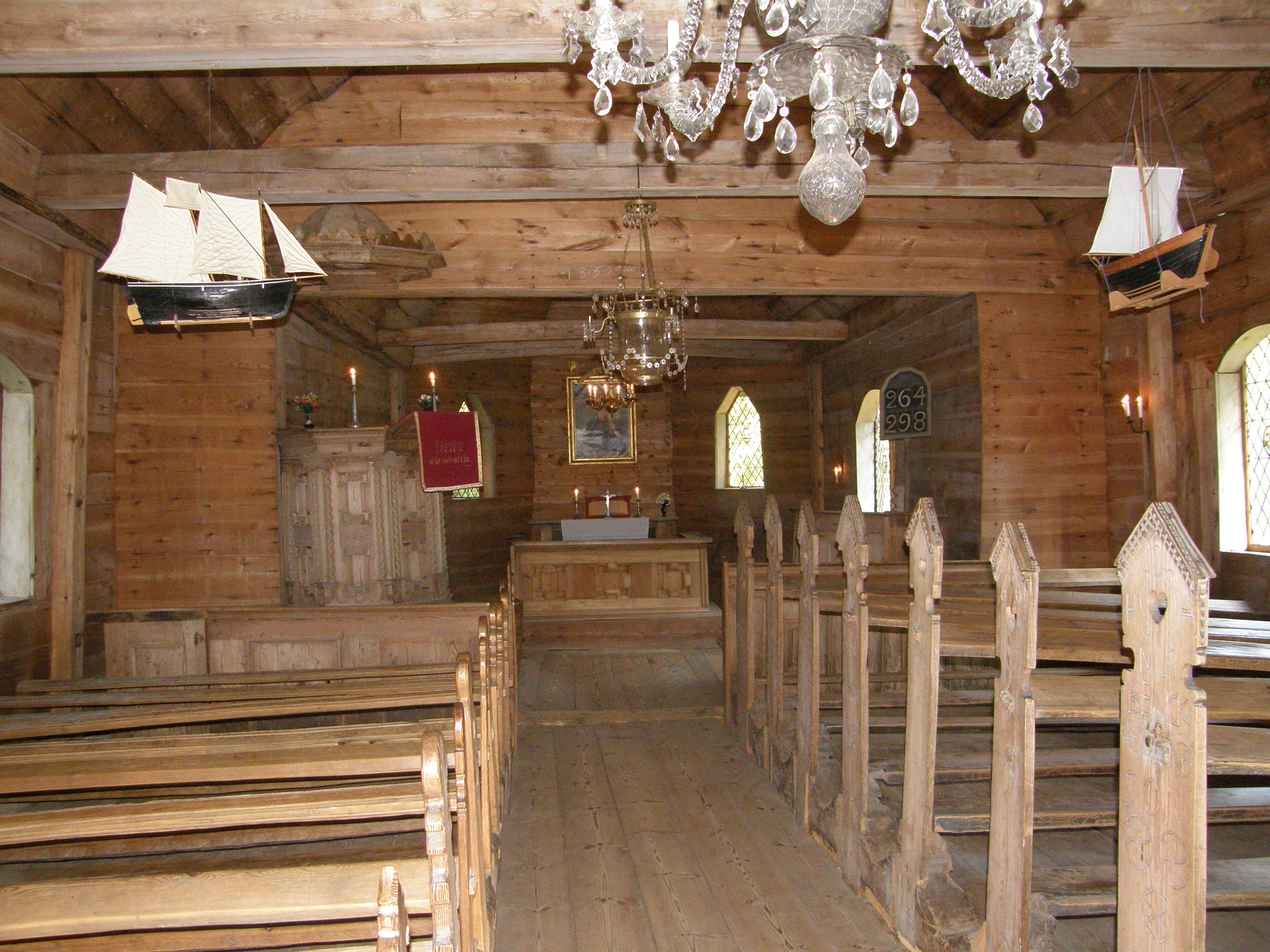 Ruhnu vana kiriku sisevaade